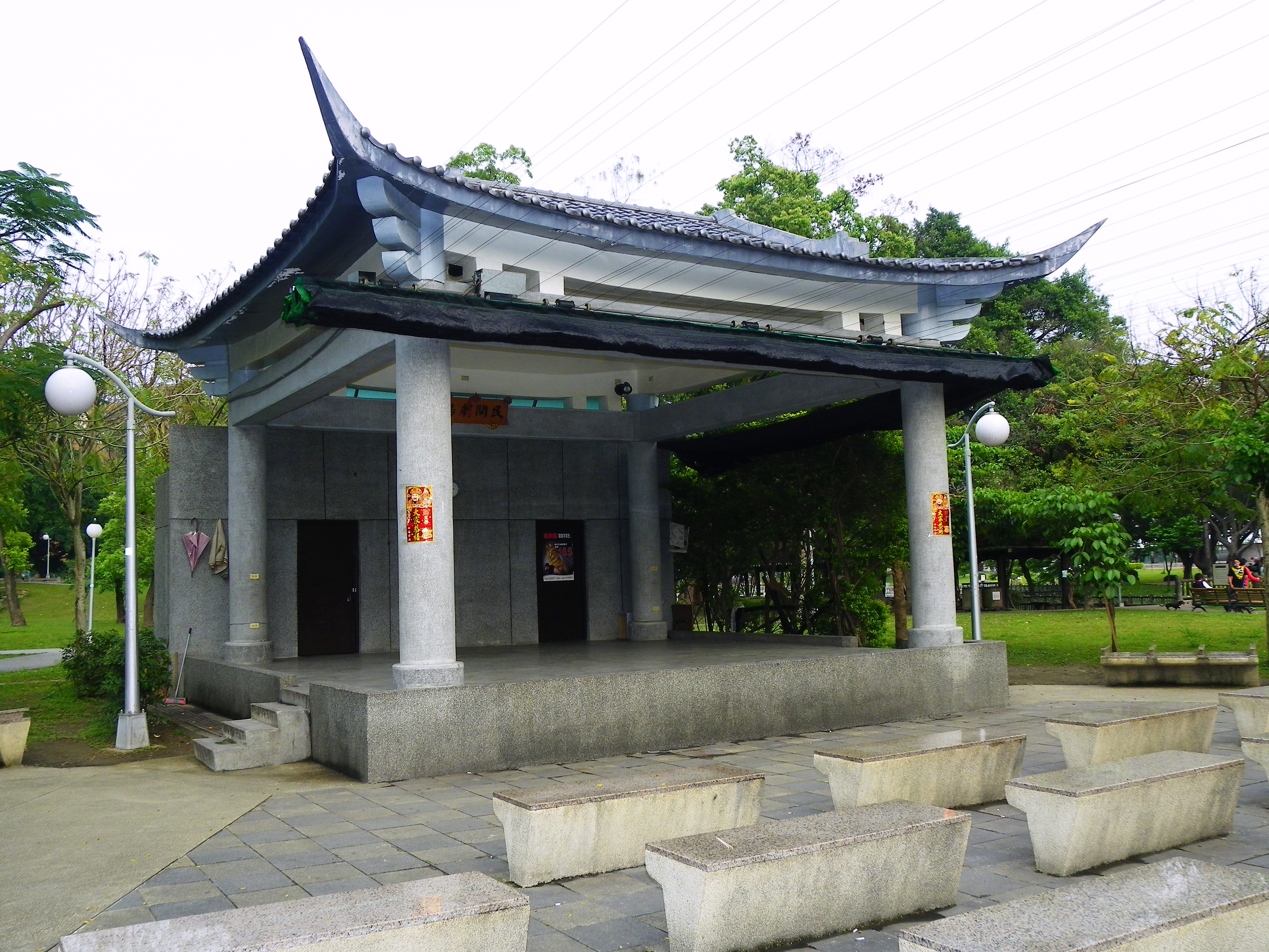 臺北市青年公園北部的民間劇場。